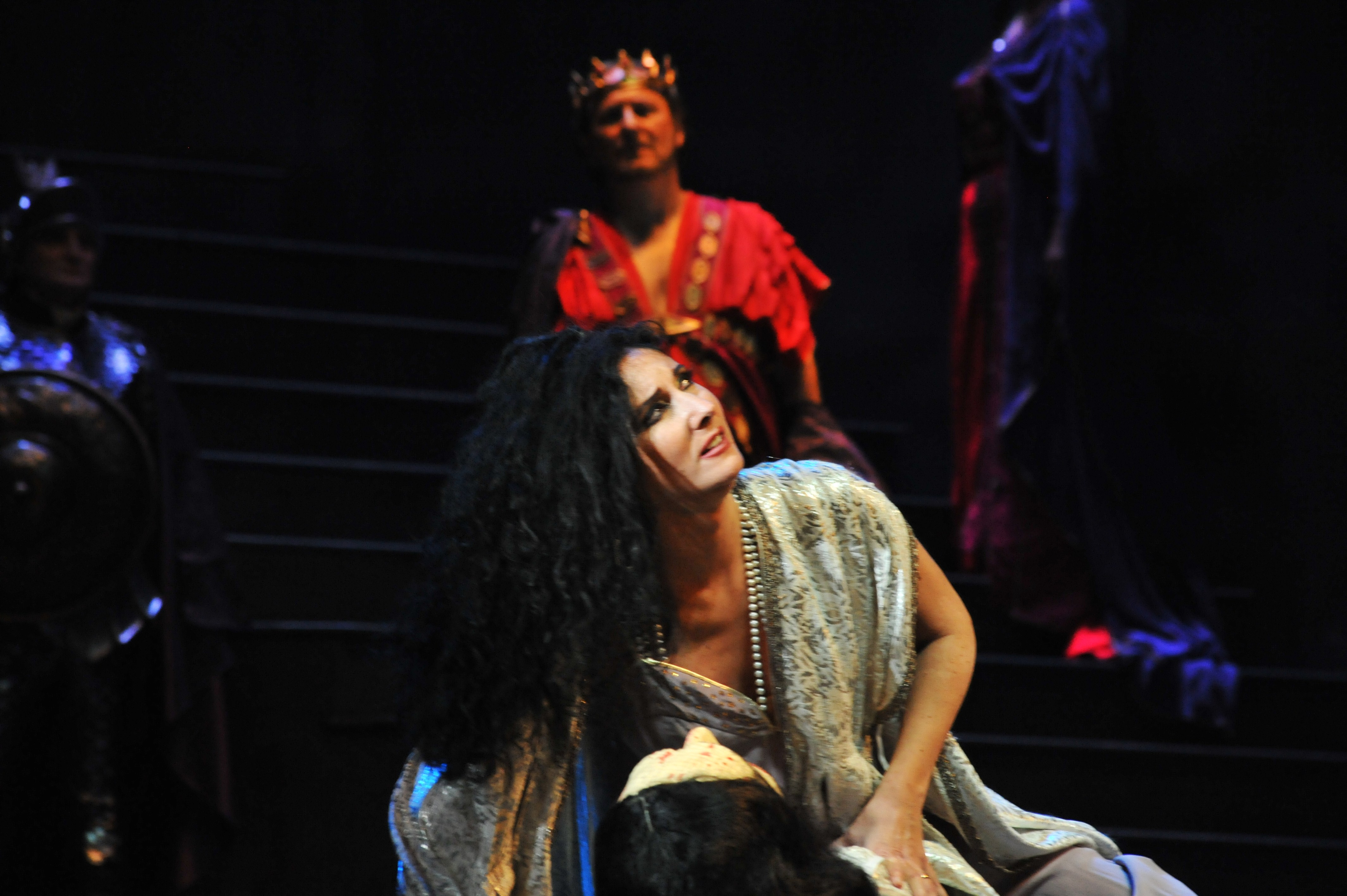 Nausicaa Policicchio in Salome di Richard Strauss